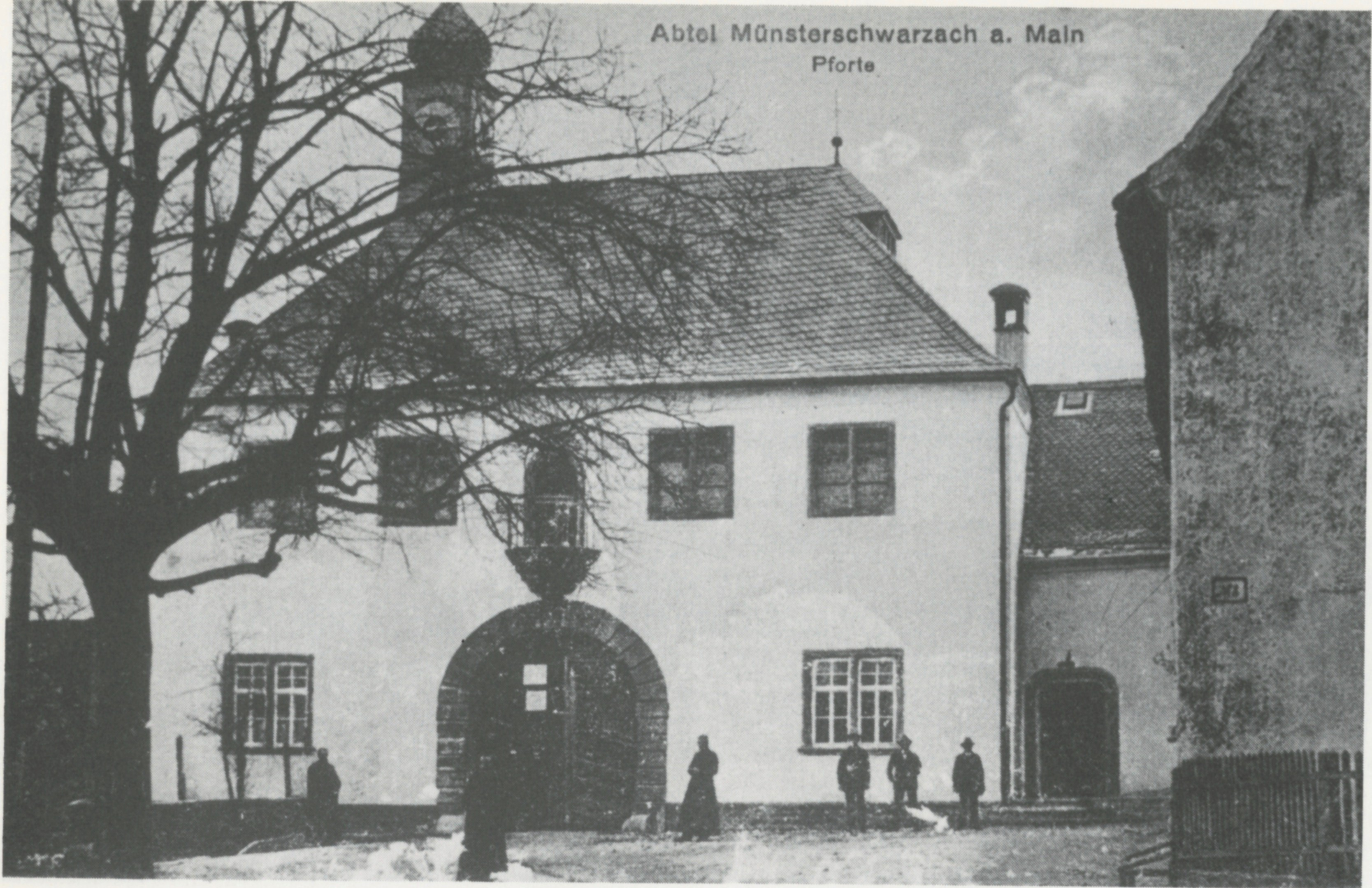 Fotografie von 1914. Münsterschwarzach: Das Torhaus der Abtei Münsterschwarzach, Bau von 1652 mit Dachreiter